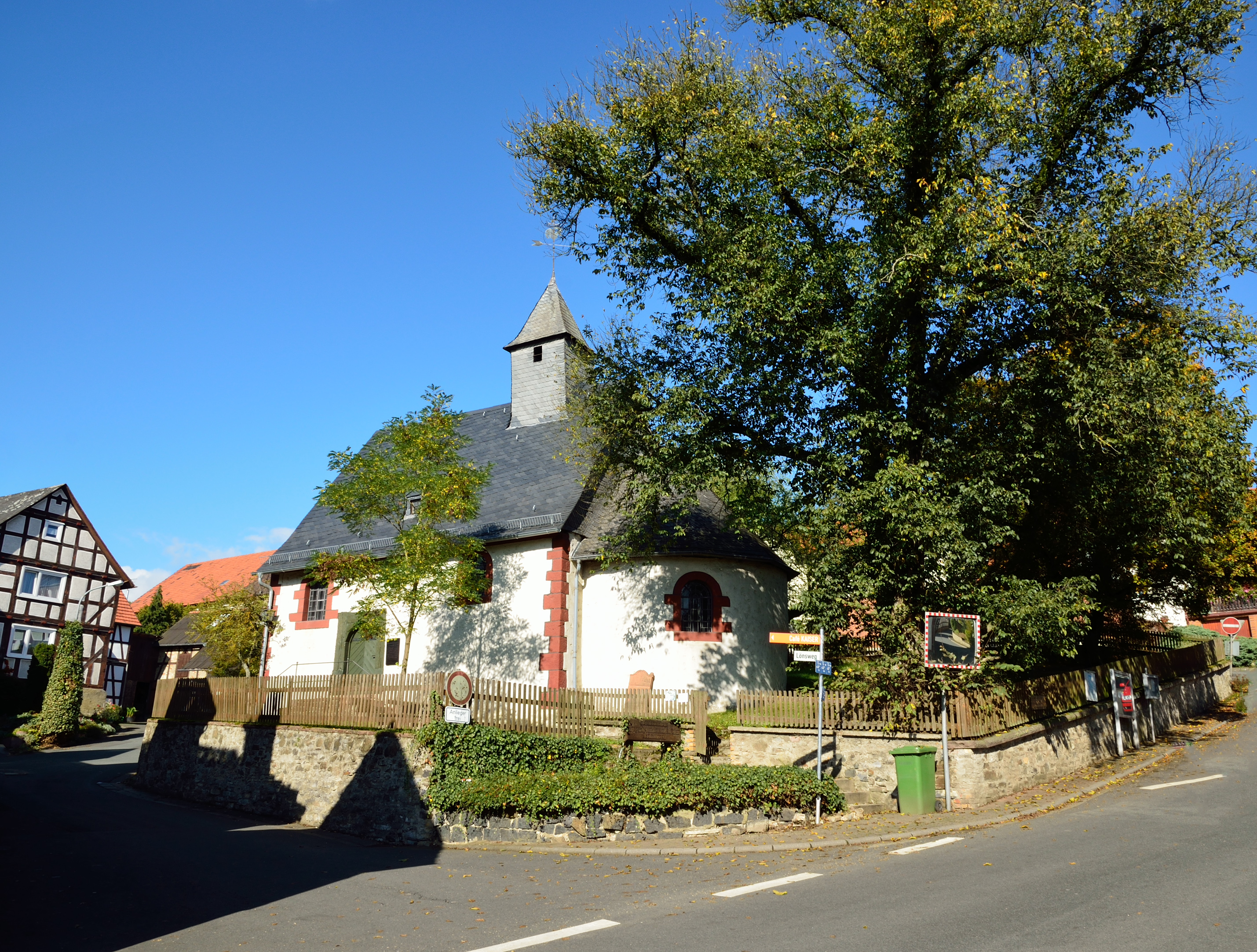 Historische ev. Kirche und Eiche Altenvers